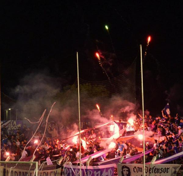 hinchada dsc